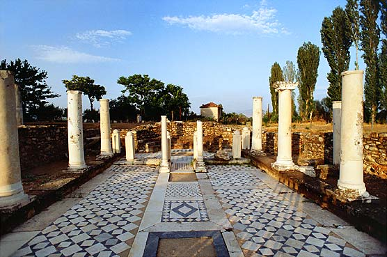 Античкиот град Хераклеја, во непосредна близина на градот Битола.